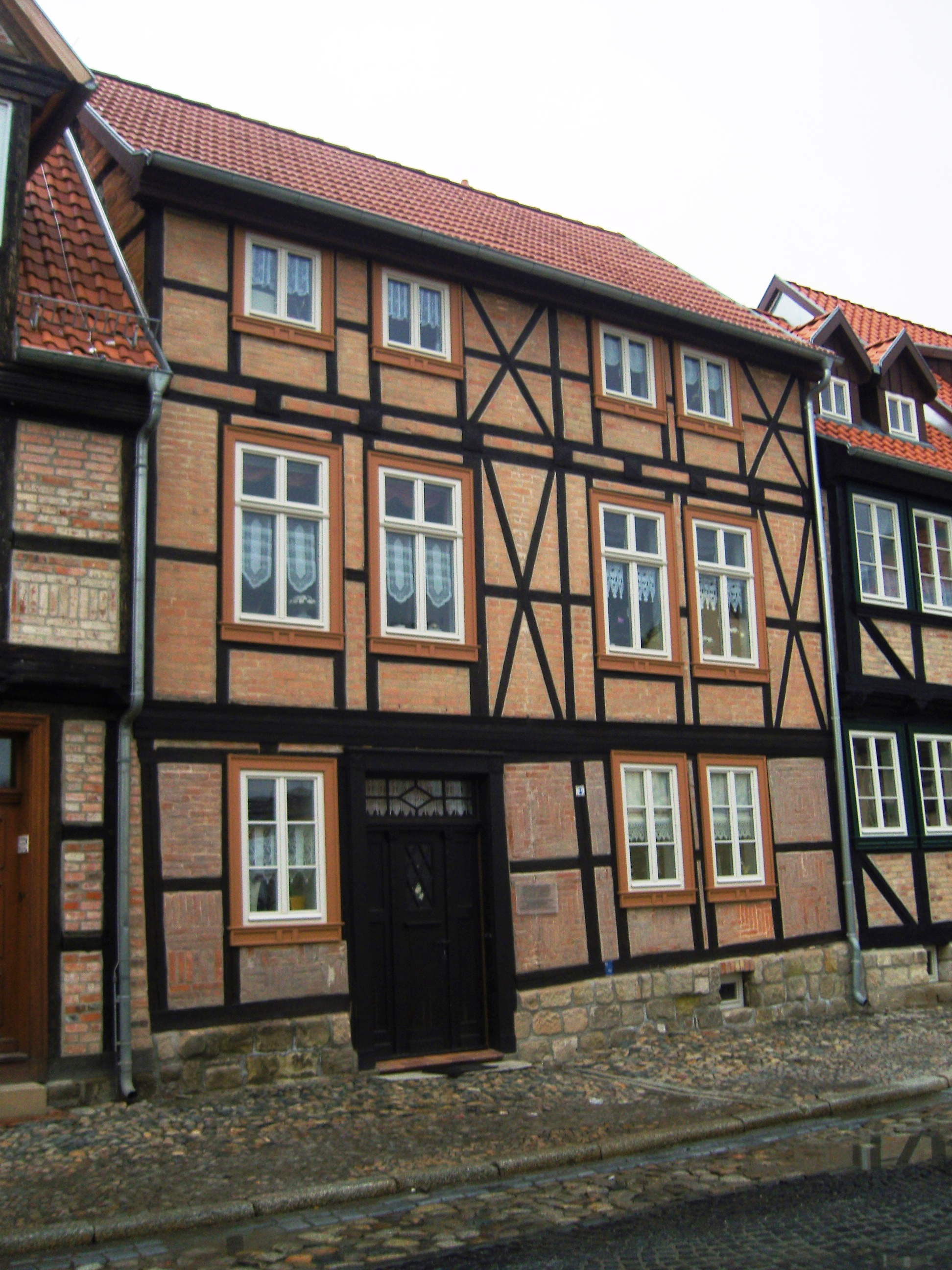 Denkmalgeschütztes Fachwerkhaus in der Straße Augustinern 6 in Quedlingburg